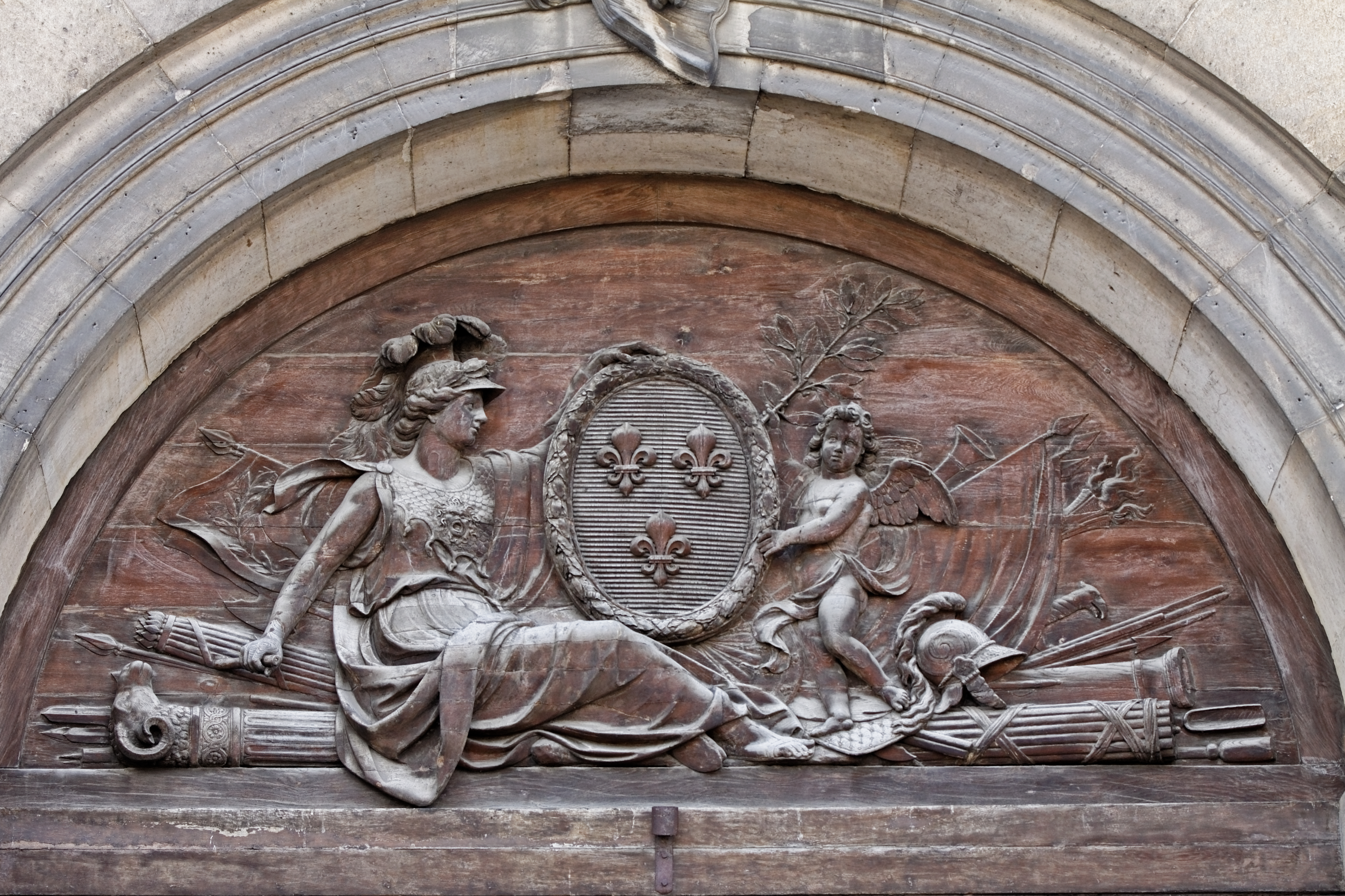 Détail de l'avant-corps de la façade nord de l'hôtel des Invalides à Paris.